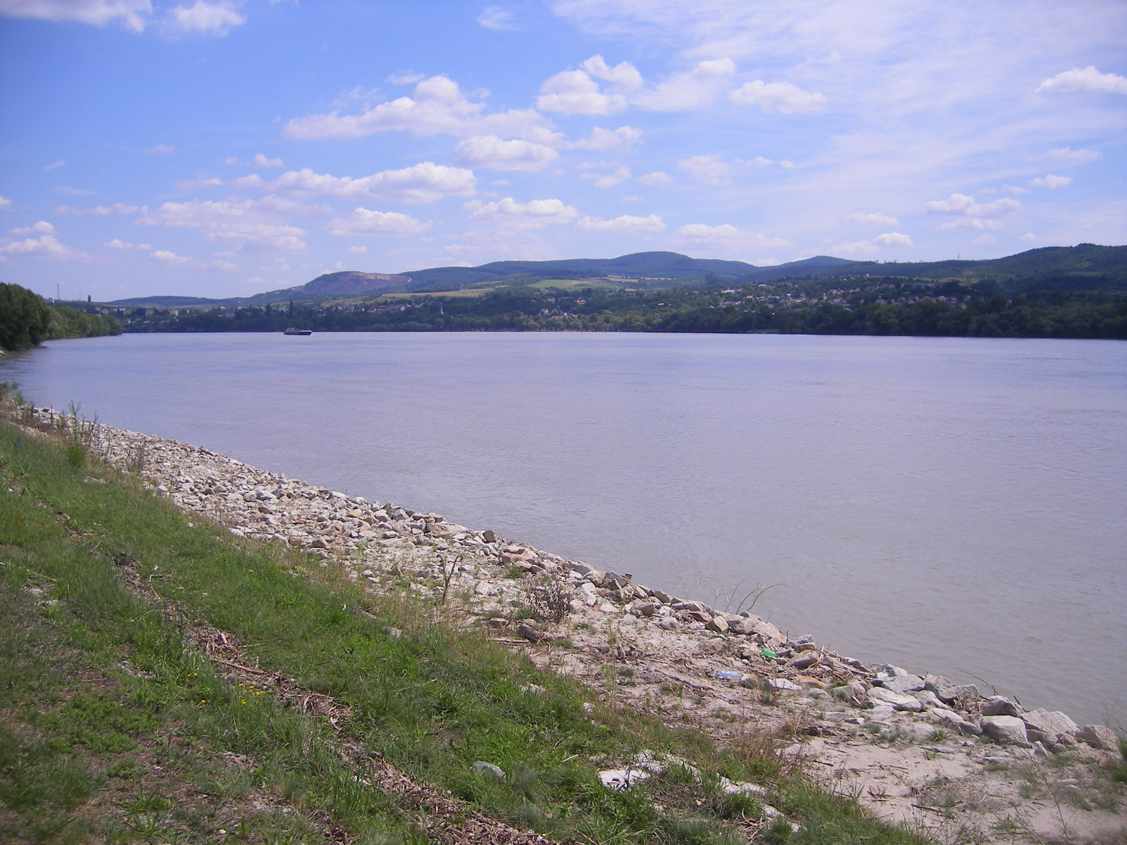 Karva - a Duna-parton, a túlparton Lábatlan